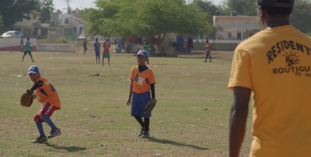 Niños entrenando.